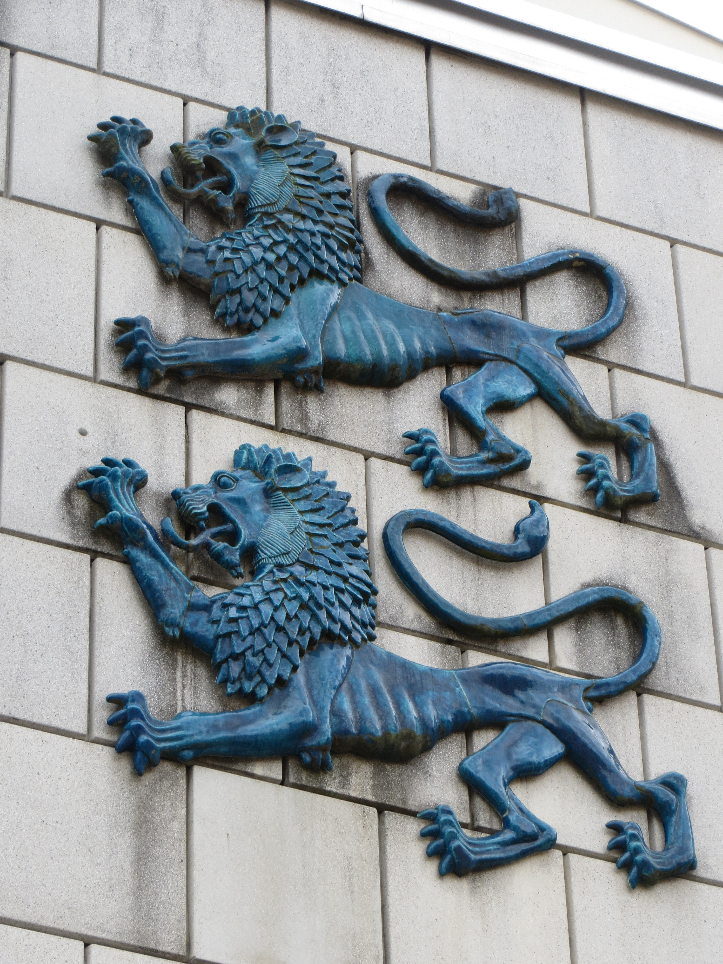 De sønderjyske løver afbilledet på Dansk Centralbibliotek for Sydslesvigs bygning i Flensborg